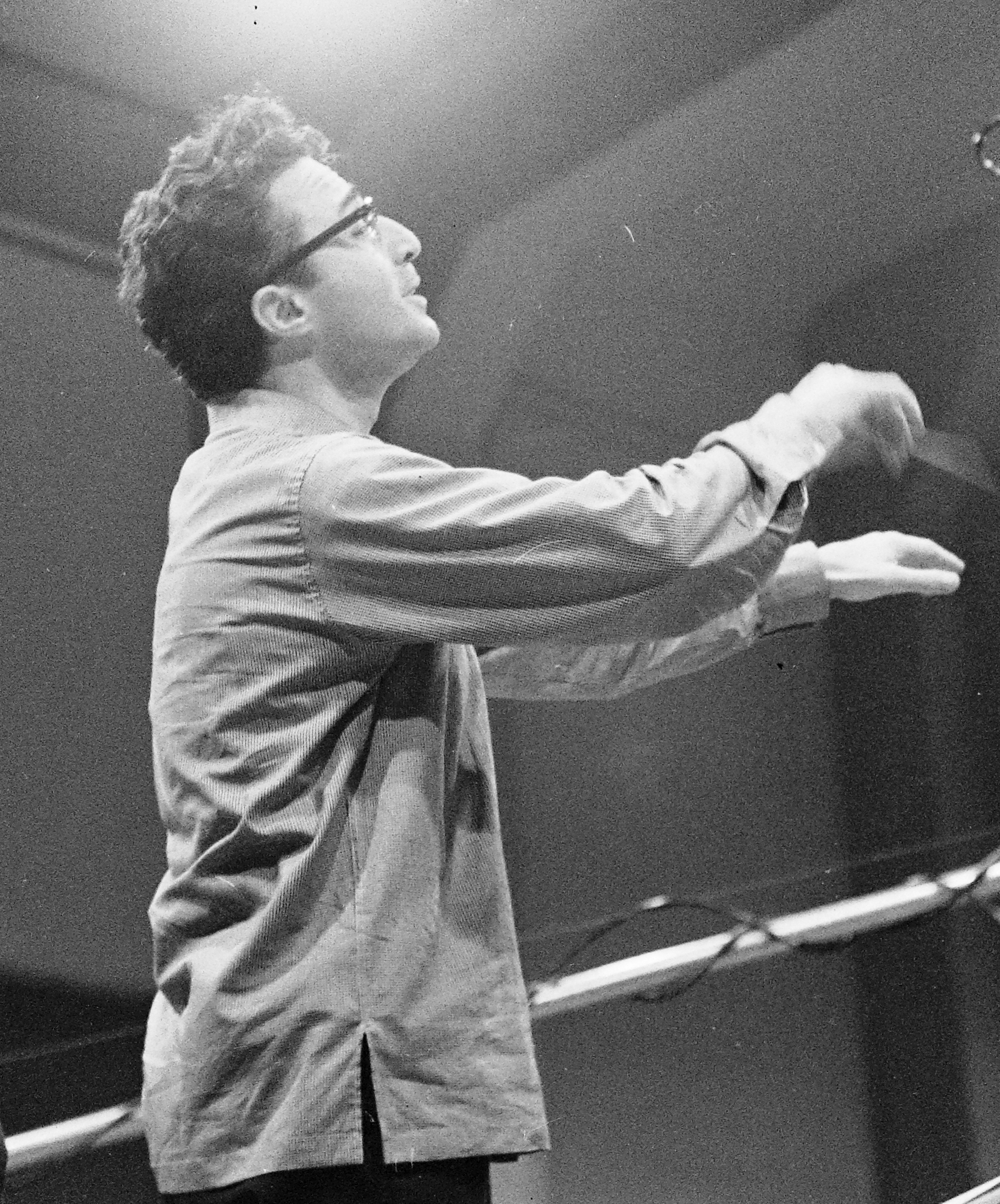 Lamberto Gardelli olasz karmester.